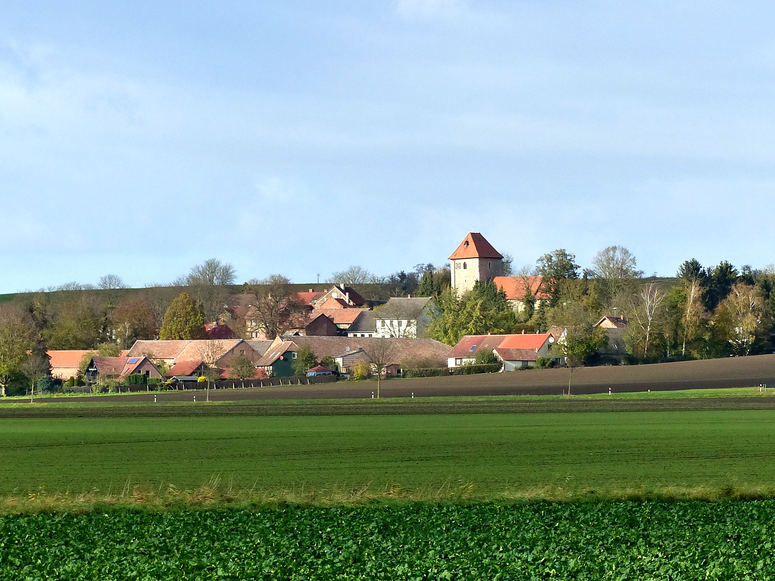 Watenstedt im Landkreis Helmstedt von Südosten.